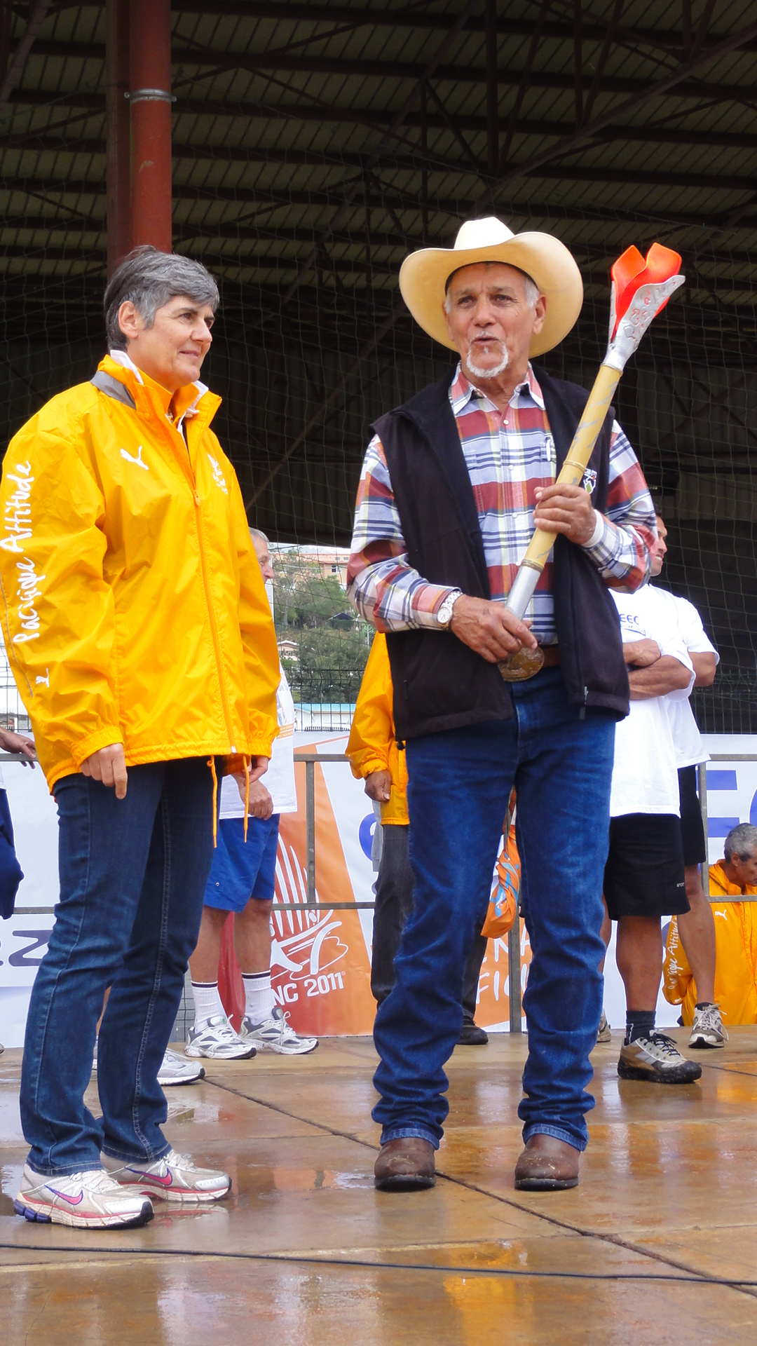 Le maire avec la flamme